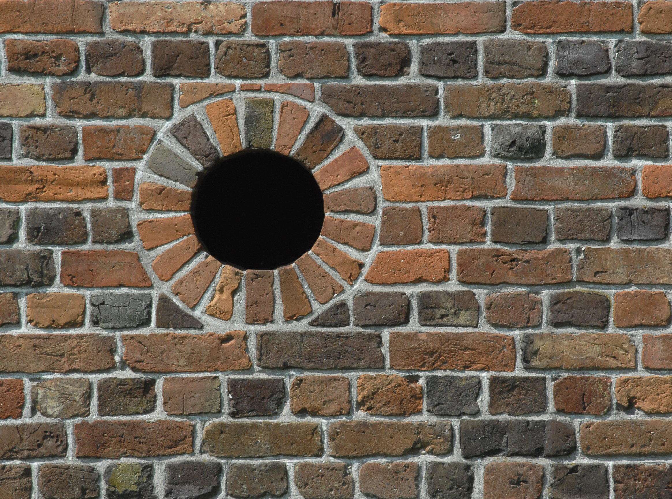 I østgavlen på stalden kommer der sparsomt lys ind gennem de murede glugger.